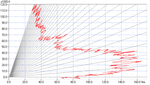 Snapshoot eines gemessenen vertikalen Antennendiagramms einer Parabolantenne (Längeneinheiten: Abszisse: nautische Meilen, Ordinate feet)